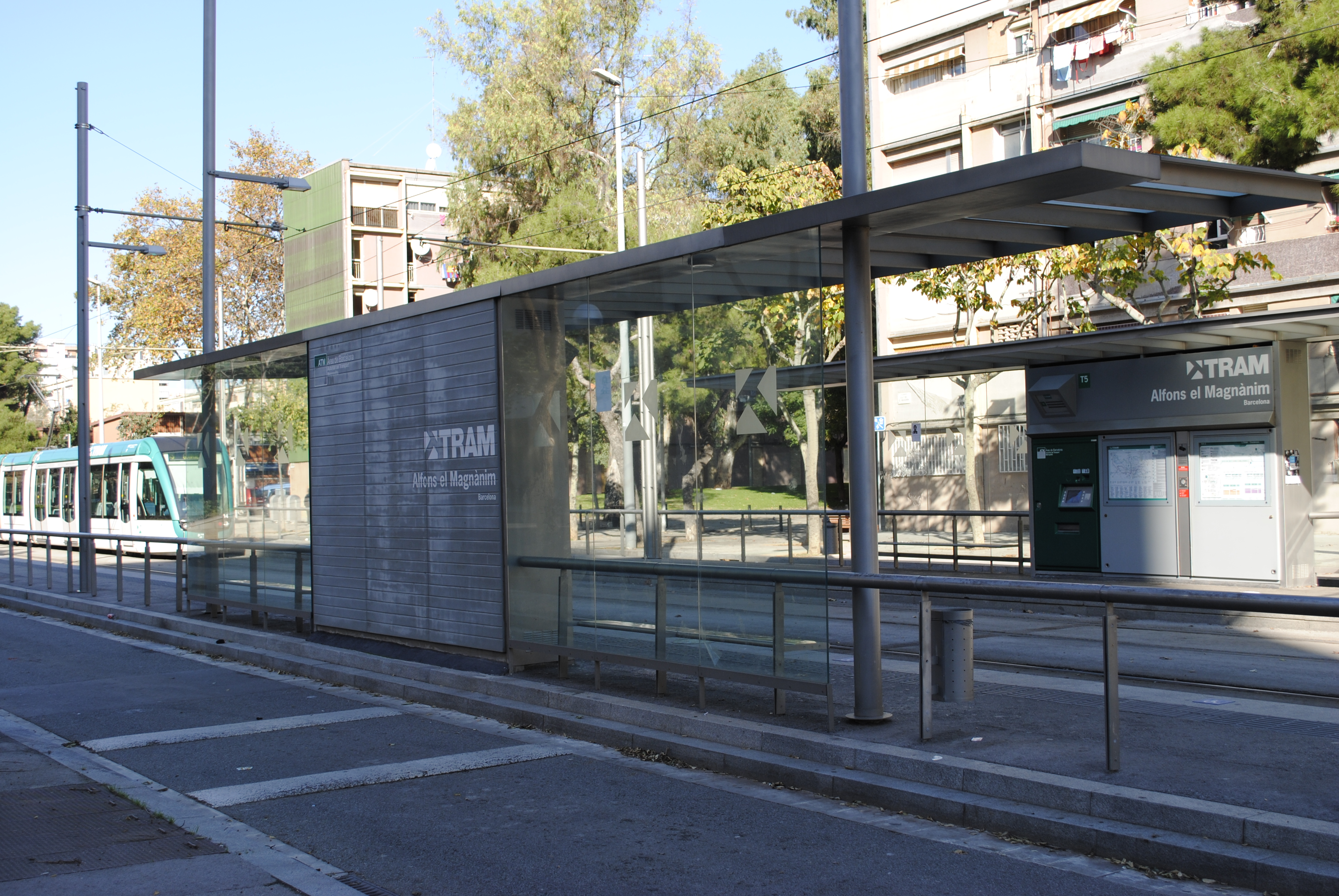 Estació Trambesòs Alfons el Magnànim